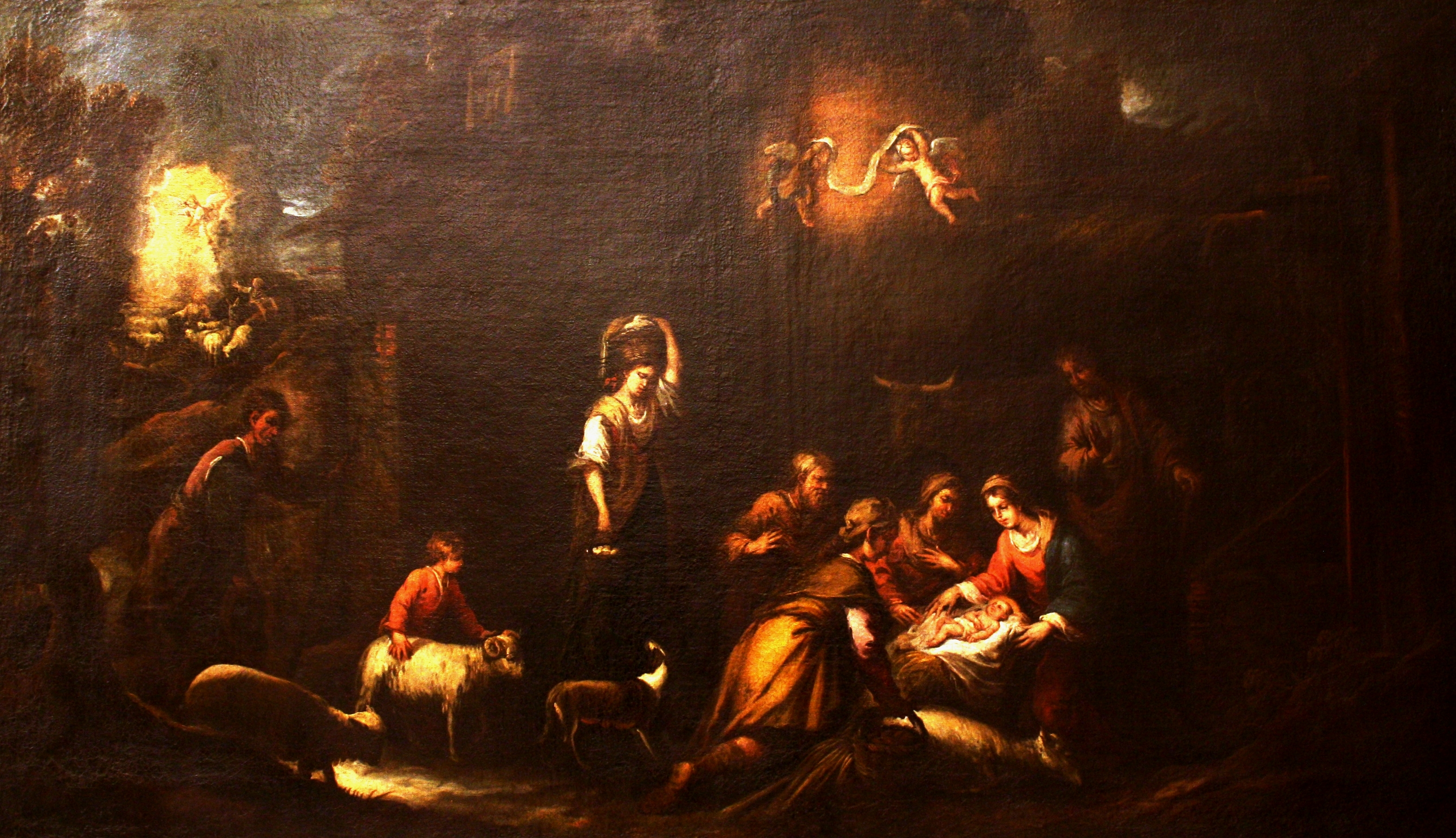 La obra representa el momento en que el Niño Jesús fue adorado por los pastores poco después de su nacimiento.